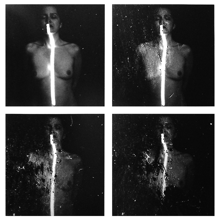 Birgit Kahle Ohne Titel 1983 Birgit Kahle (1957–) DescriptionGerman artistDate of birth 1957 Location of birth Cologne Work period1980-Work location Germany, ItalyAuthority control : Q28736363 VIAF: 10472521 ISNI: 0000 0001 0777 1498 ULAN: 500115319 LCCN: nr96017659 GND: 171939824 WorldCat creator QS:P170,Q28736363